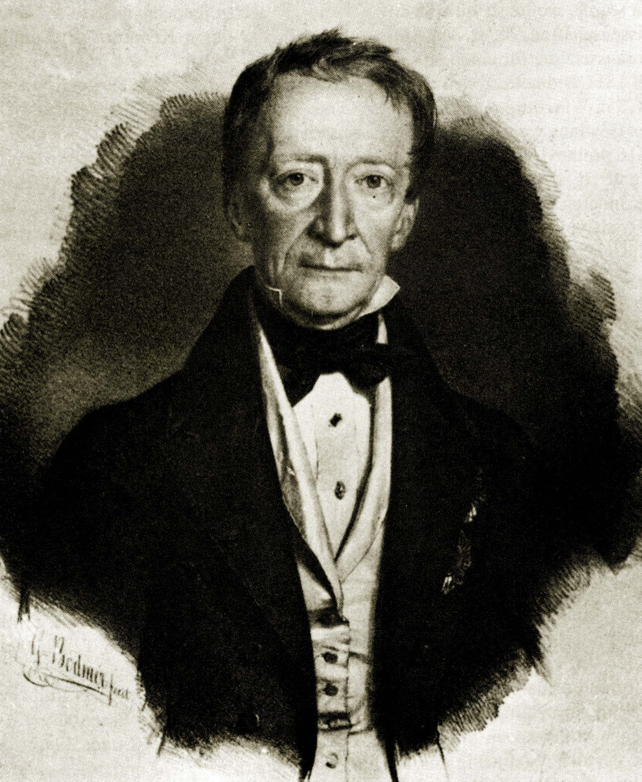 Arnold Friedrich von Mieg, Statistican for Bavaria